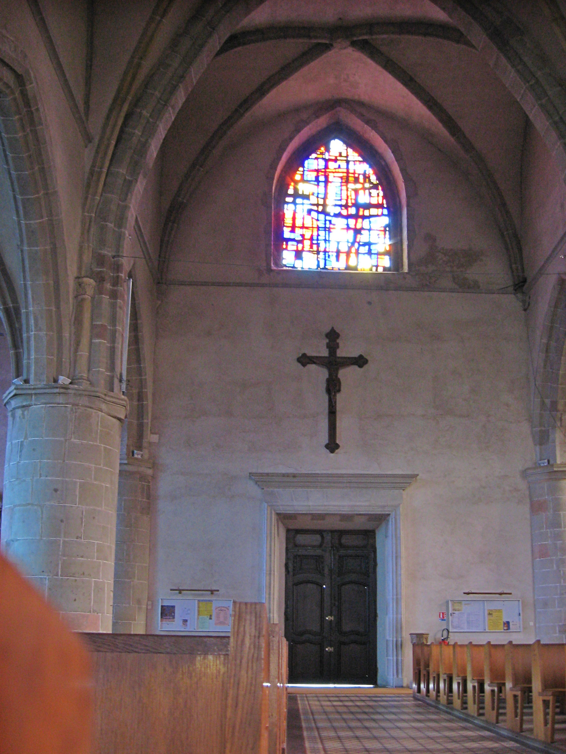 Kirche in Bouzonville